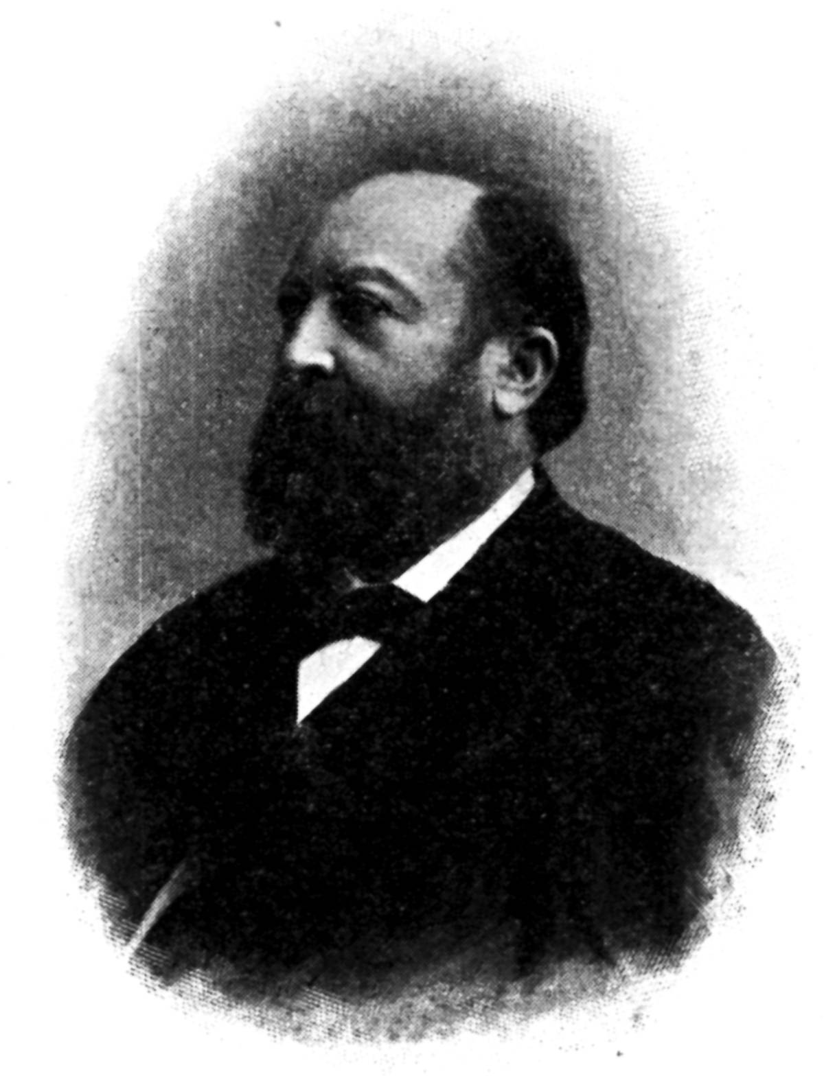 Carl Ritter von Fernwald Braun (1822-1891), obstetrician